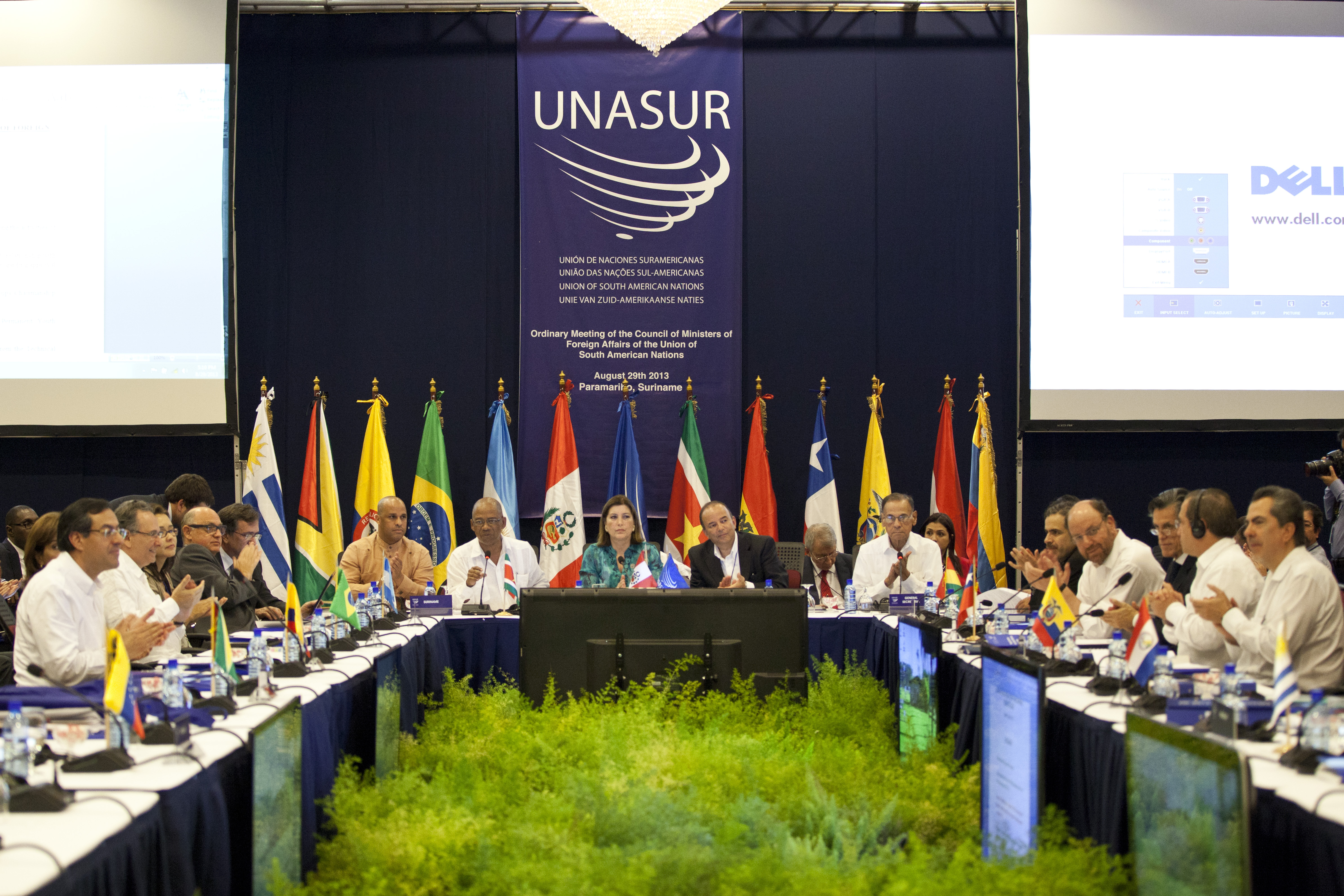 Paramaribo (Surinam), 29 de agosto 2013. En el Hotel Torarica se realiza la Reunión Ordinaria del Consejo de Ministro de Relaciones Exteriores. Foto: Fernanda LeMarie - Cancillería del Ecuador.